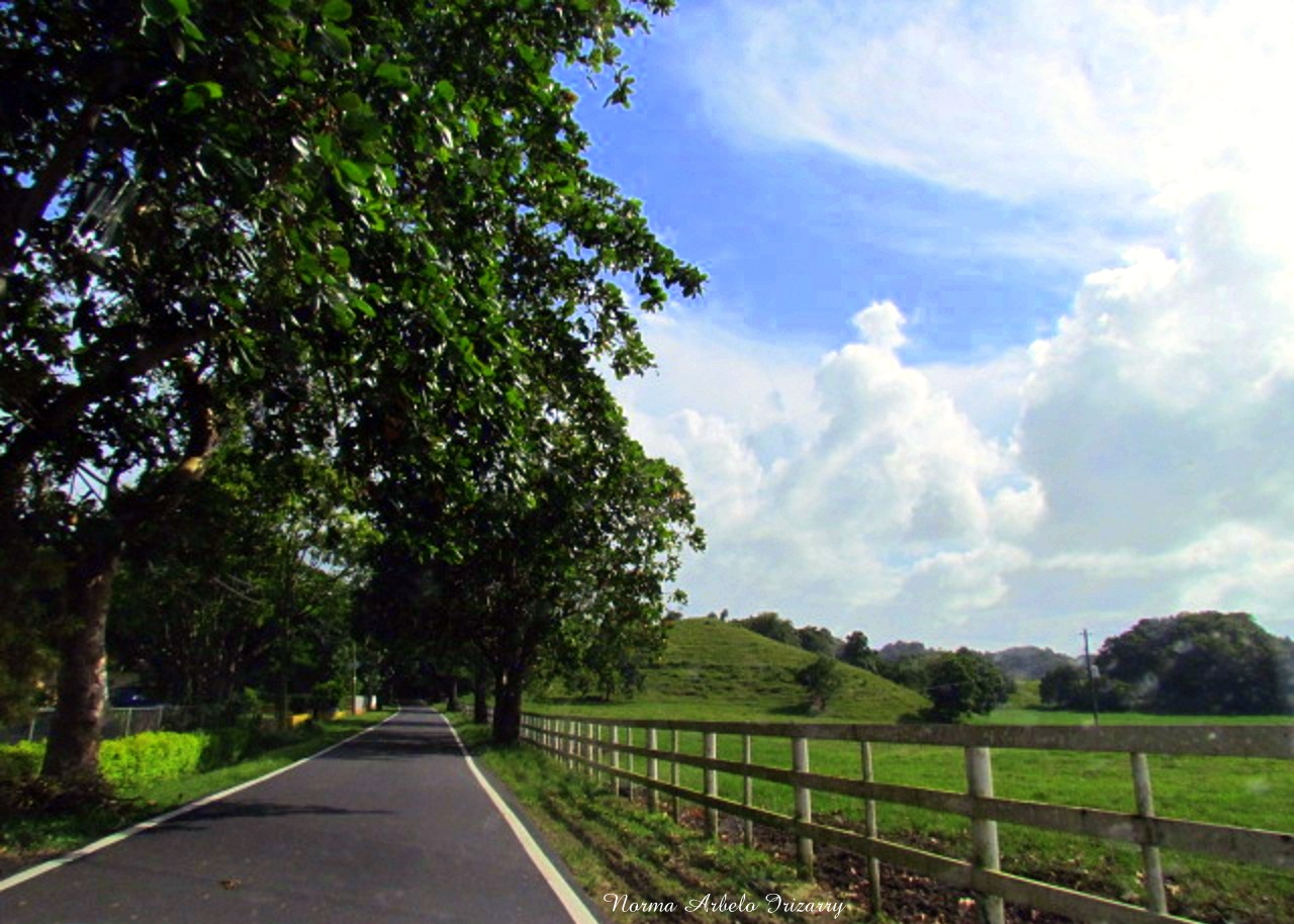 Barrio Zanja, caminito hacia Abra Honda - Camuy, Puerto Rico